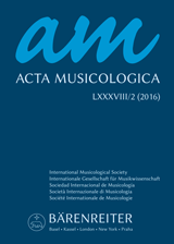 Cover of Acta Musicologica